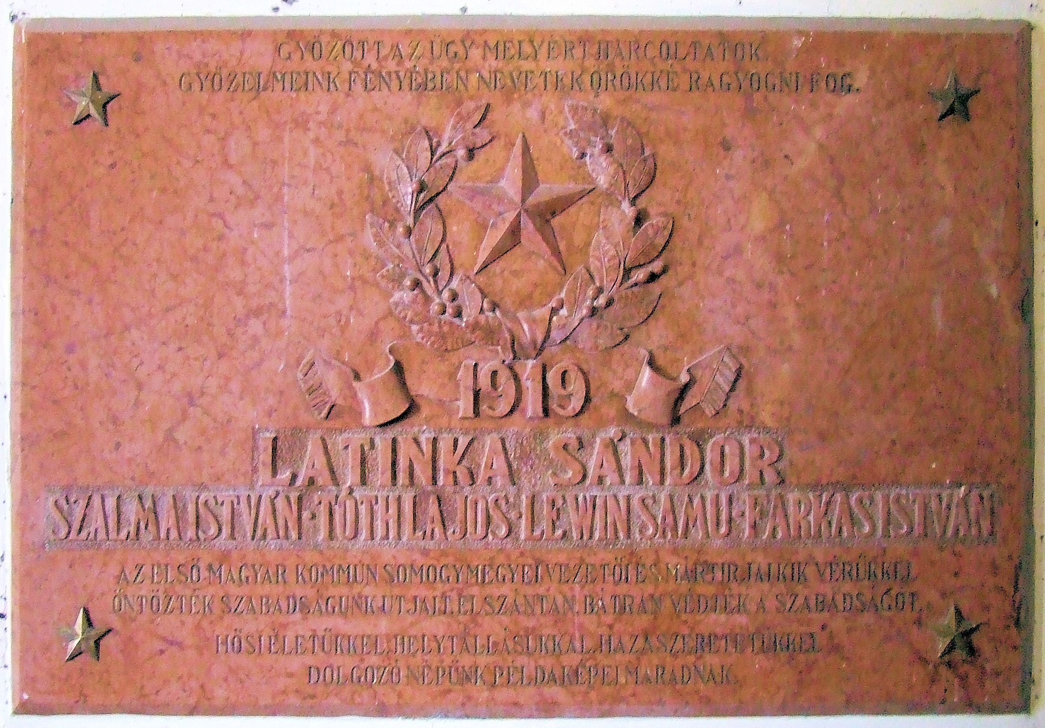 Latinka Sándor és mártírtársai – Szalma István, Tóth Lajos, Lewin Samu és Farkas István – emléktáblája a kaposvári Rippl-Rónai Múzeum előcsarnokában